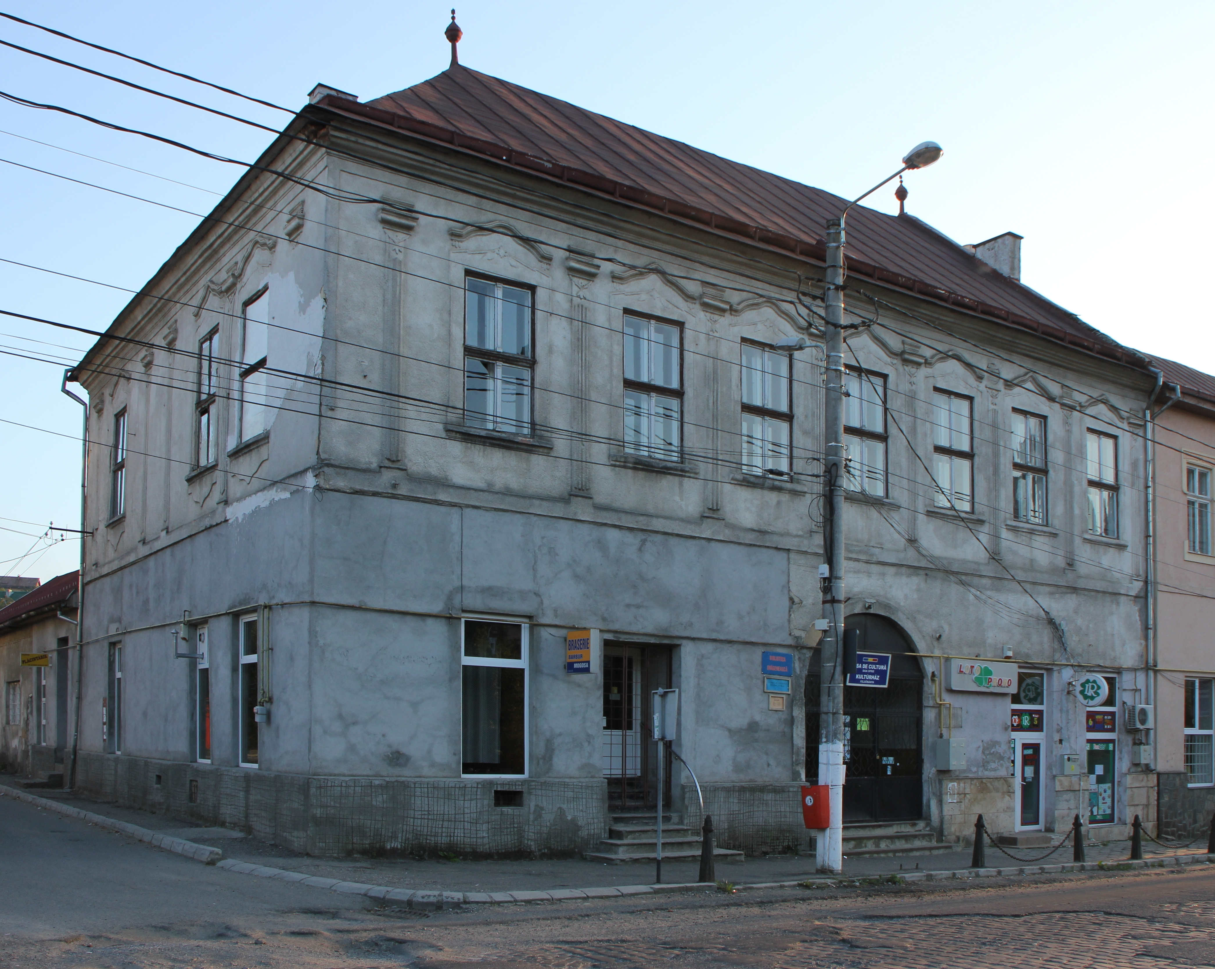 Hotel "Corona", oraș Baia Sprie, Piața Libertății 1, 1890-1909